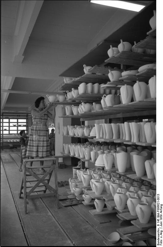 Selb/Bayern Porzellan-Manufaktur Fa. Heinrich Zum Glasieren bereites Porzellan 8. Juni - 12. Juni 1959